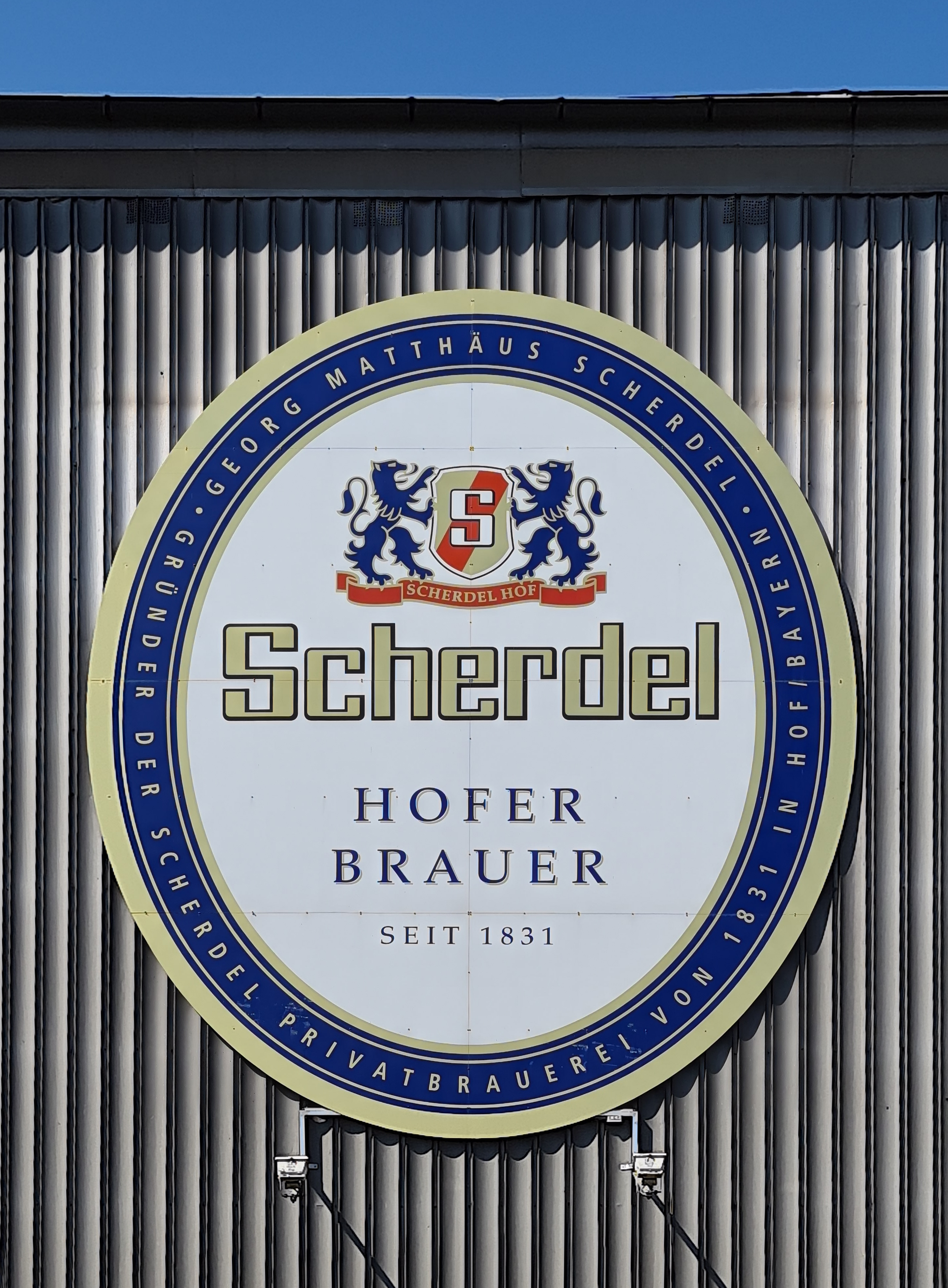 Logo der Scherdel Bier GmbH & Co., das von der Straße gut sichtbar hängt.